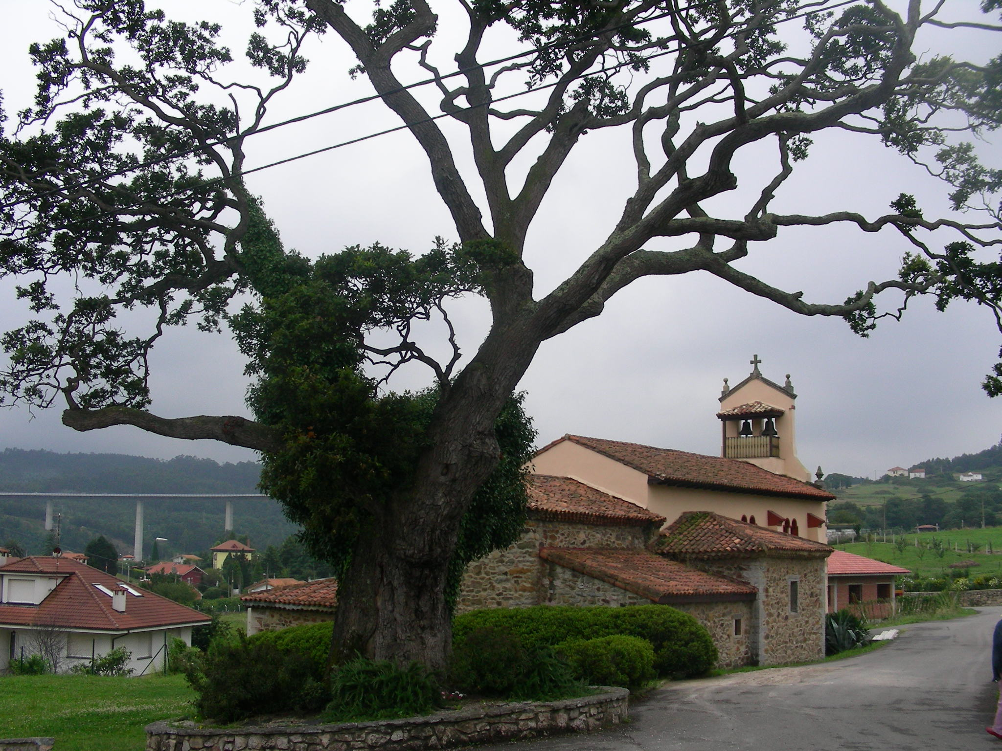 Roble centenario (carbayo en Asturias) e Iglesia situadas en el concejo de Castrillón.